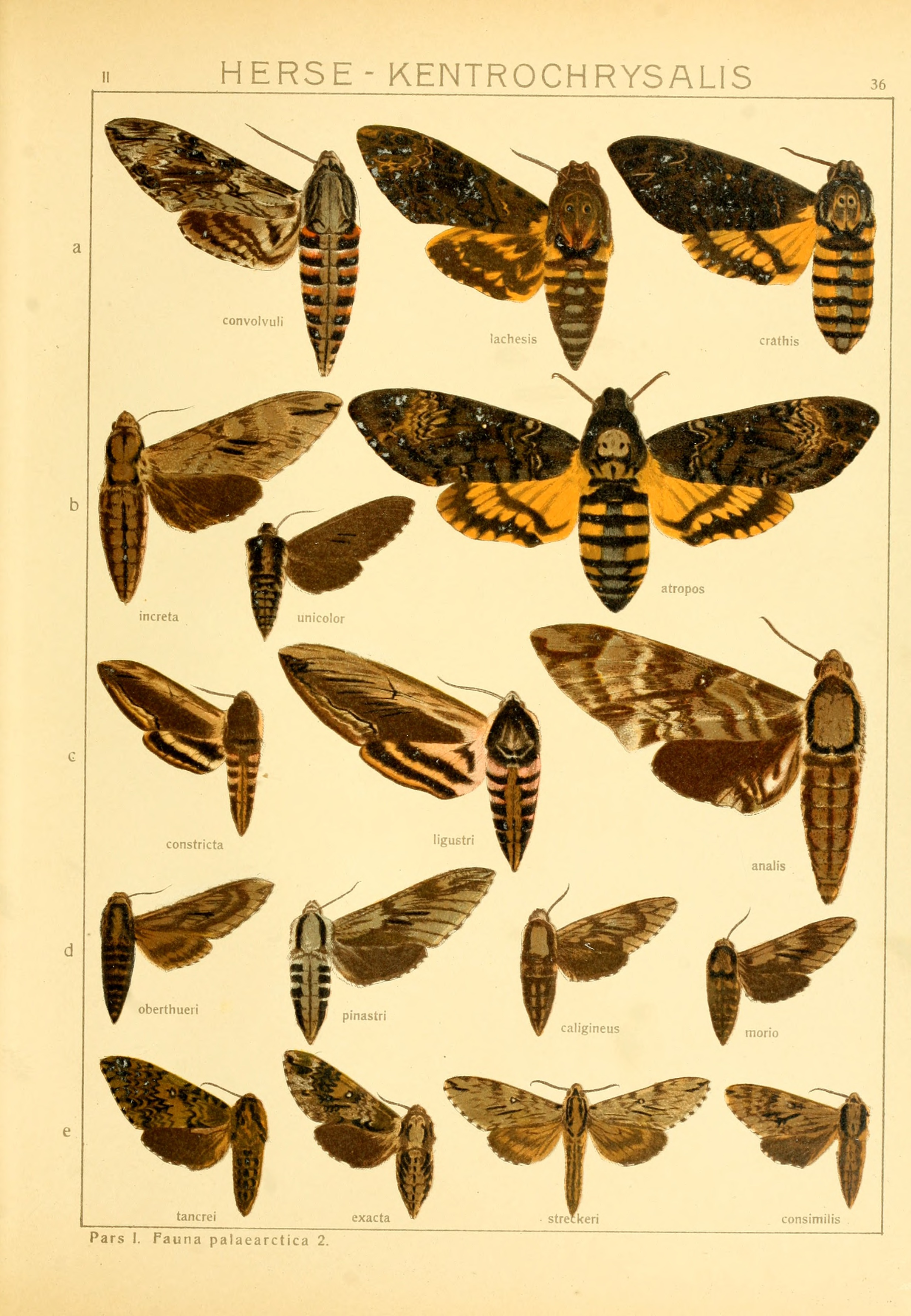 Plate from Seitz,1912- 1913 A. Ed. Die Großschmetterlinge der Erde, Verlag Alfred Kernen, Stuttgart Band 2: Abt. 1, Die Großschmetterlinge des palaearktischen Faunengebietes, Die palaearktischen Spinner und Schwärmer, 1912- 1913 The Macrolepidoptera of the world : a systematic account of all the known Macrolepidoptera Volume 2 (1912-1916) text online read text See The Global Lepidoptera Names Index for valid names